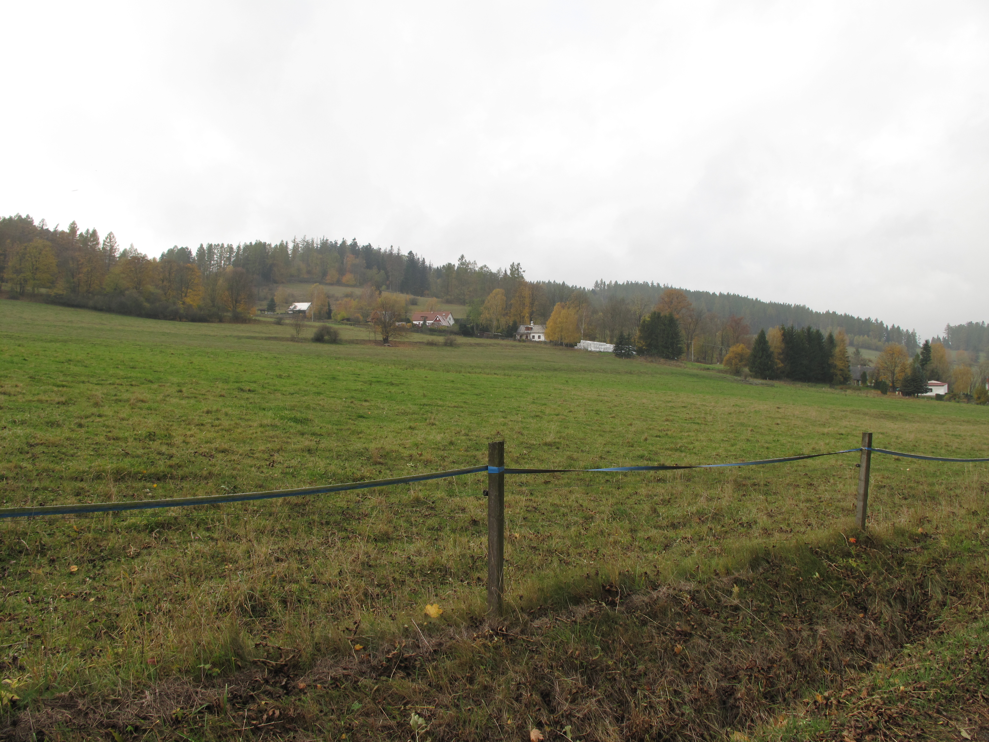 Široká Niva. Okres Bruntál, Česká republika.